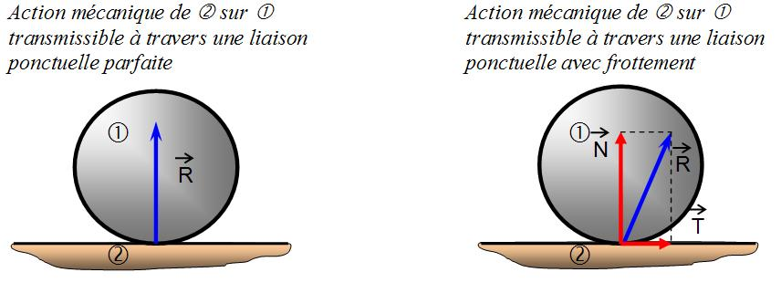 Comparaison des modèles de ponctuelle parfaites ou avec frottement